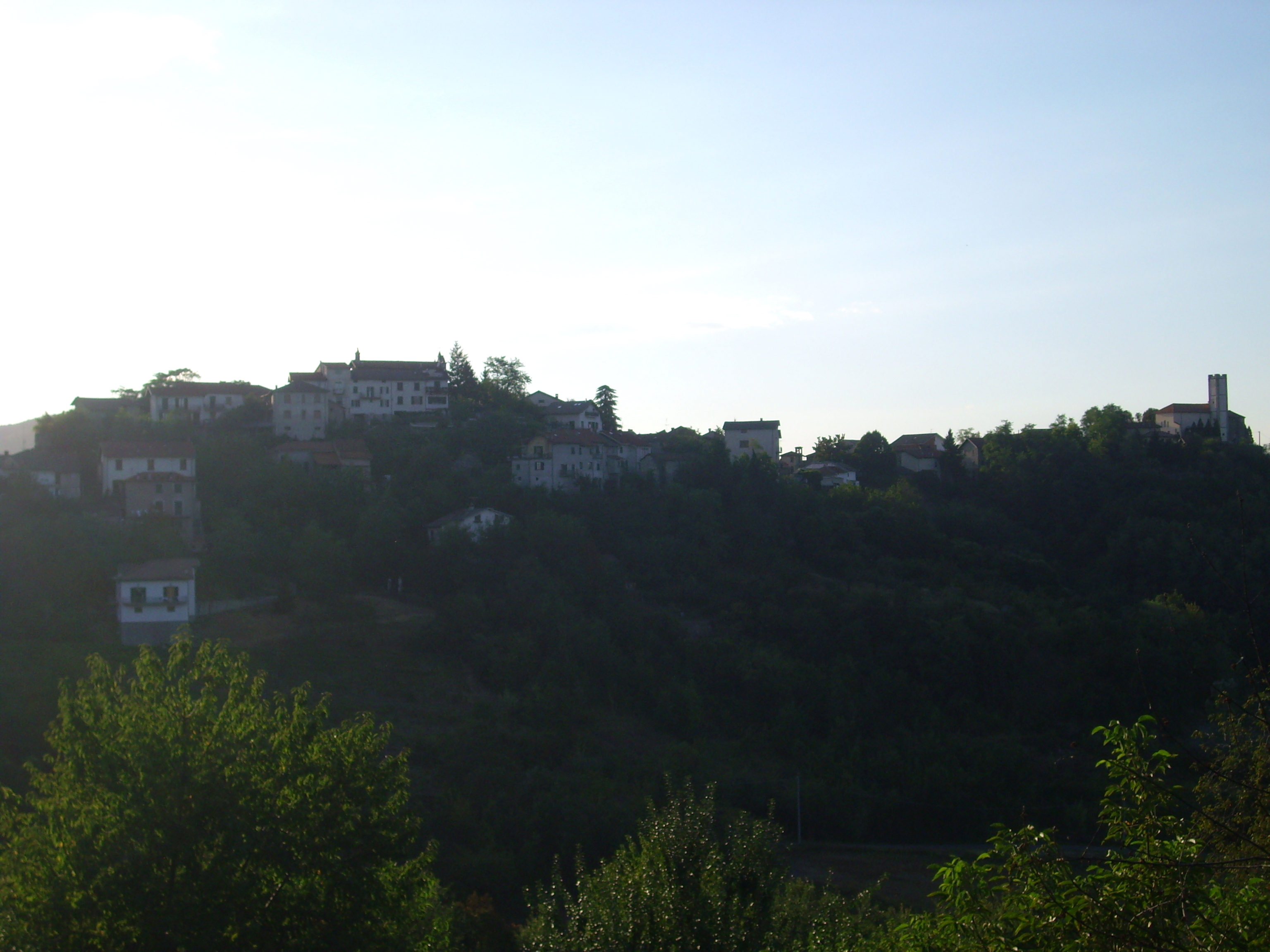 Il comune di Cassinelle